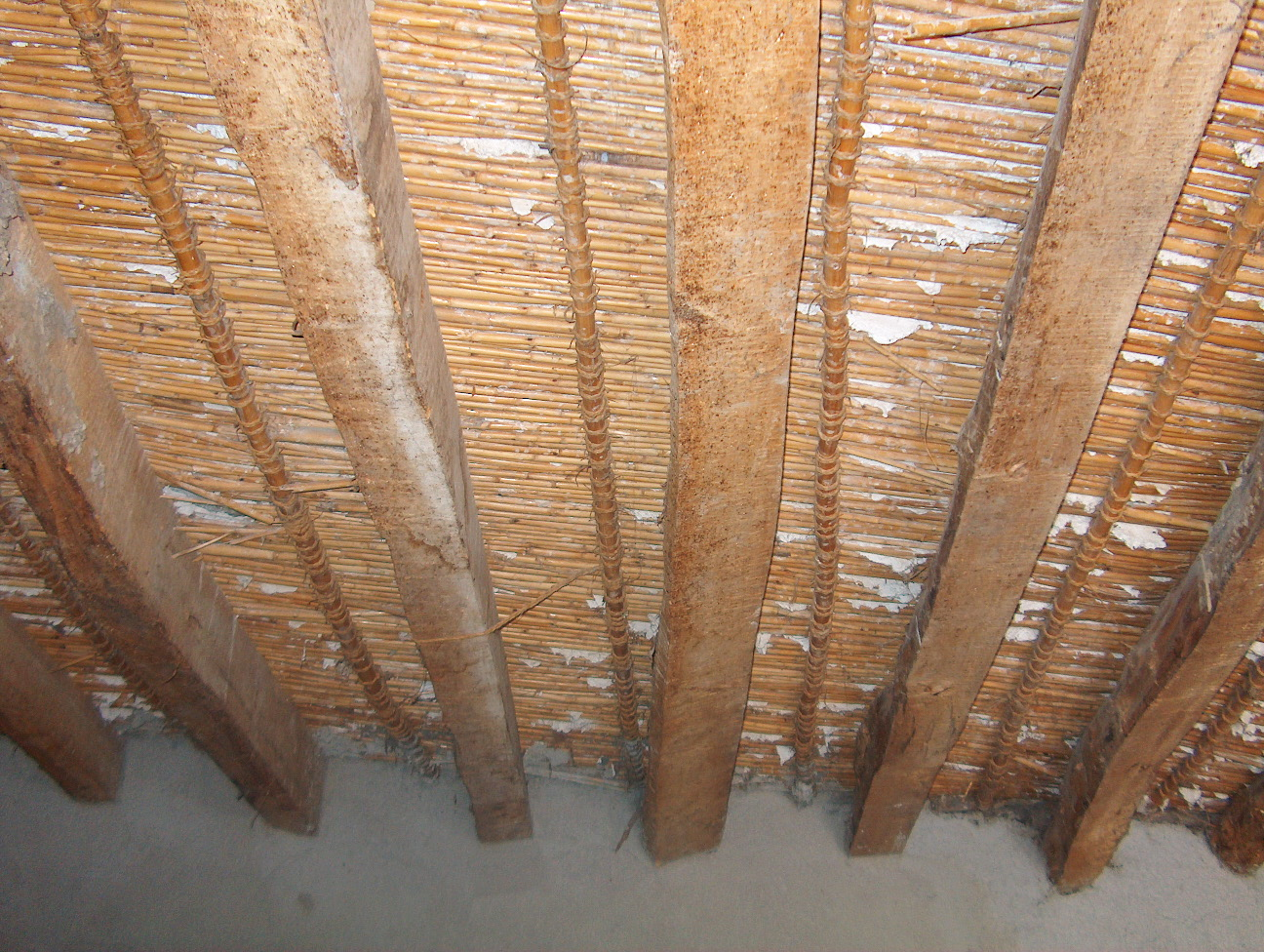 Typical Benitagla roof